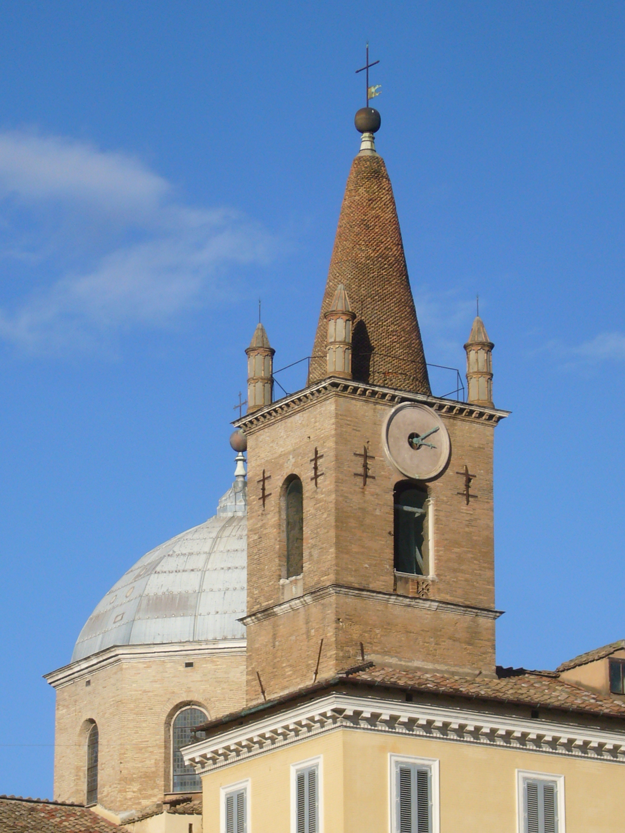 Roma, campanile e cupola di S. Maria del Popolo.